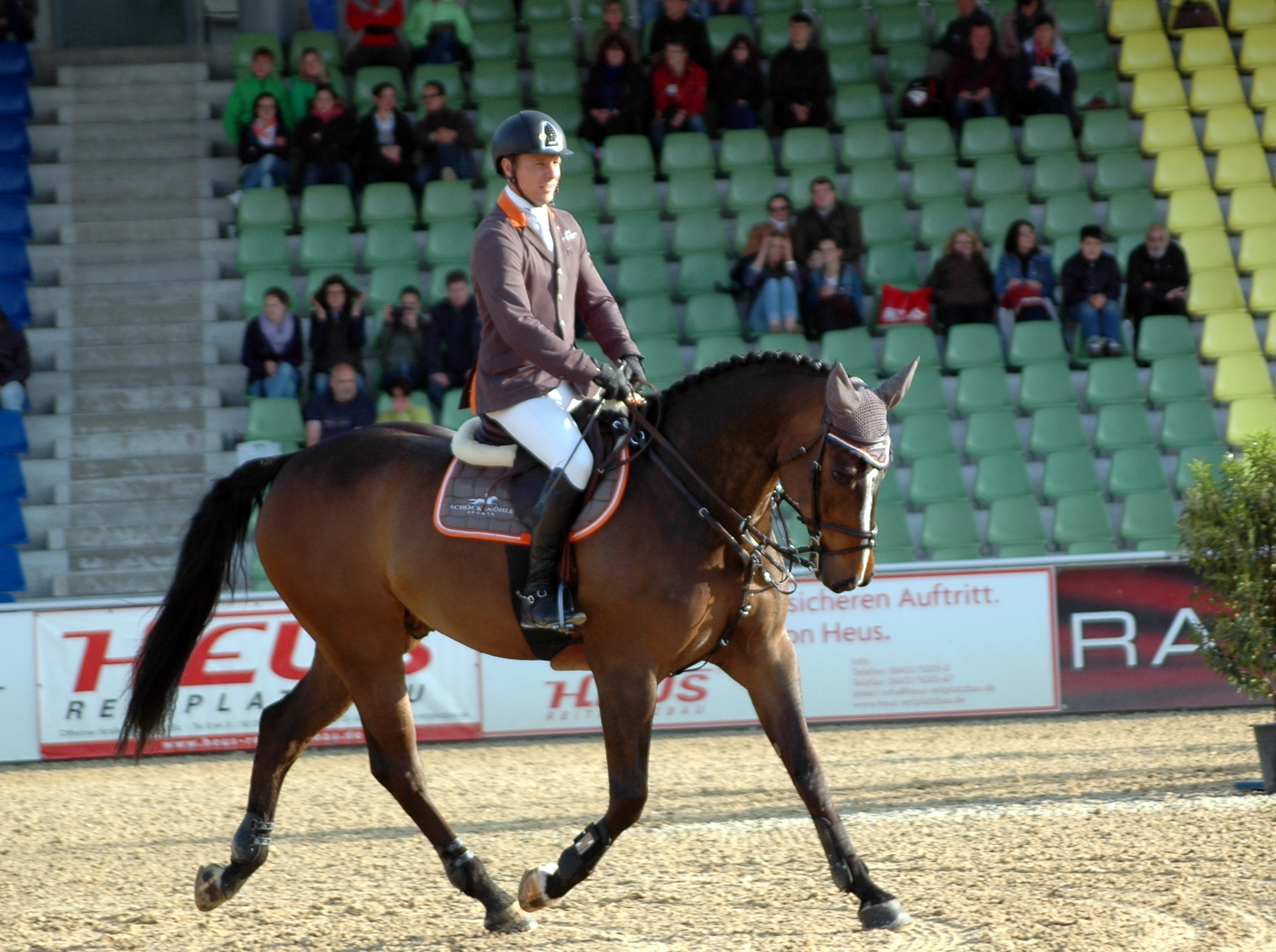 51. Maimarkt-Turnier